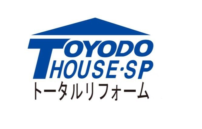 東洋堂ハウスSP ロゴ